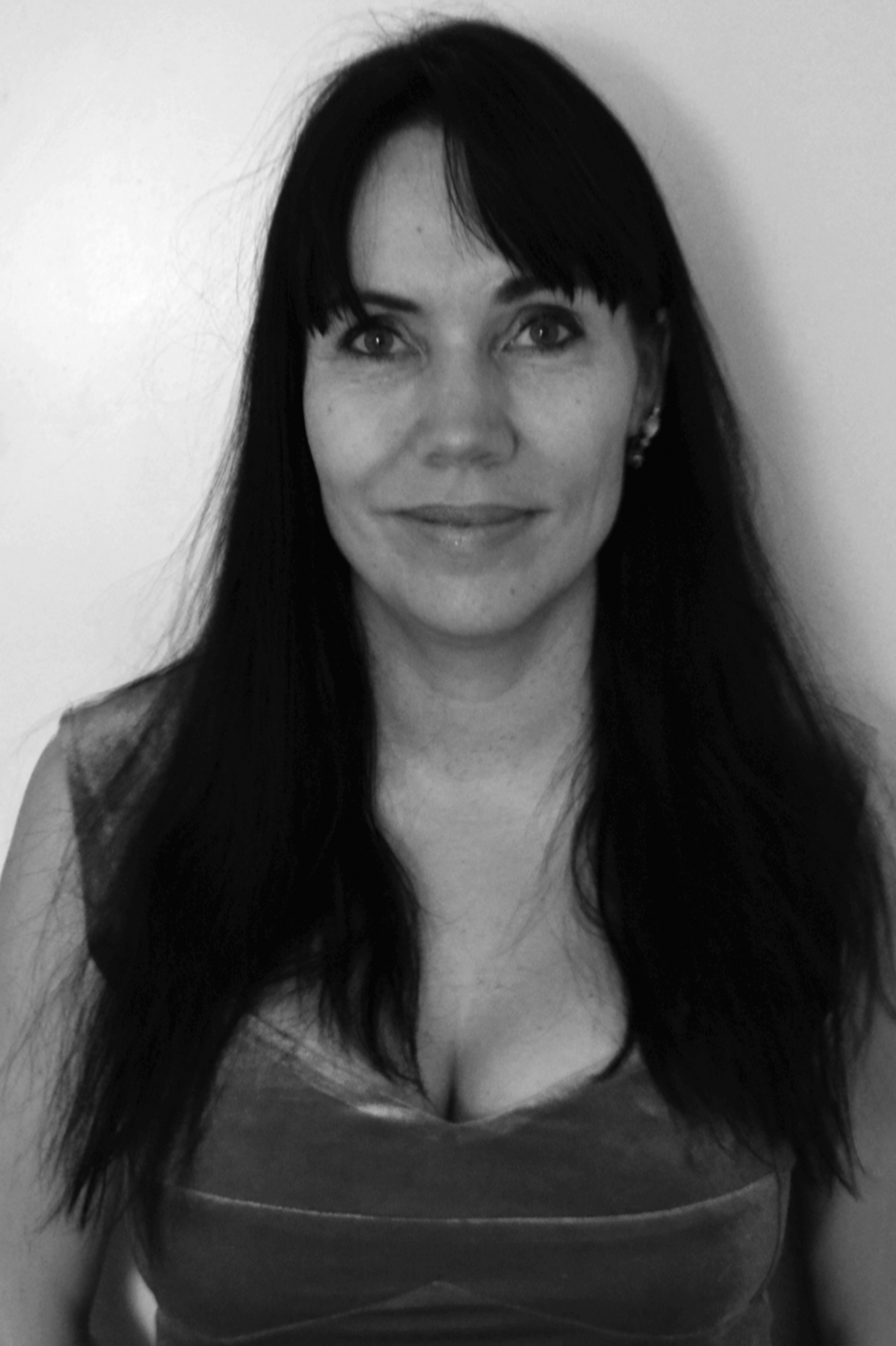 Titta Heikkilä